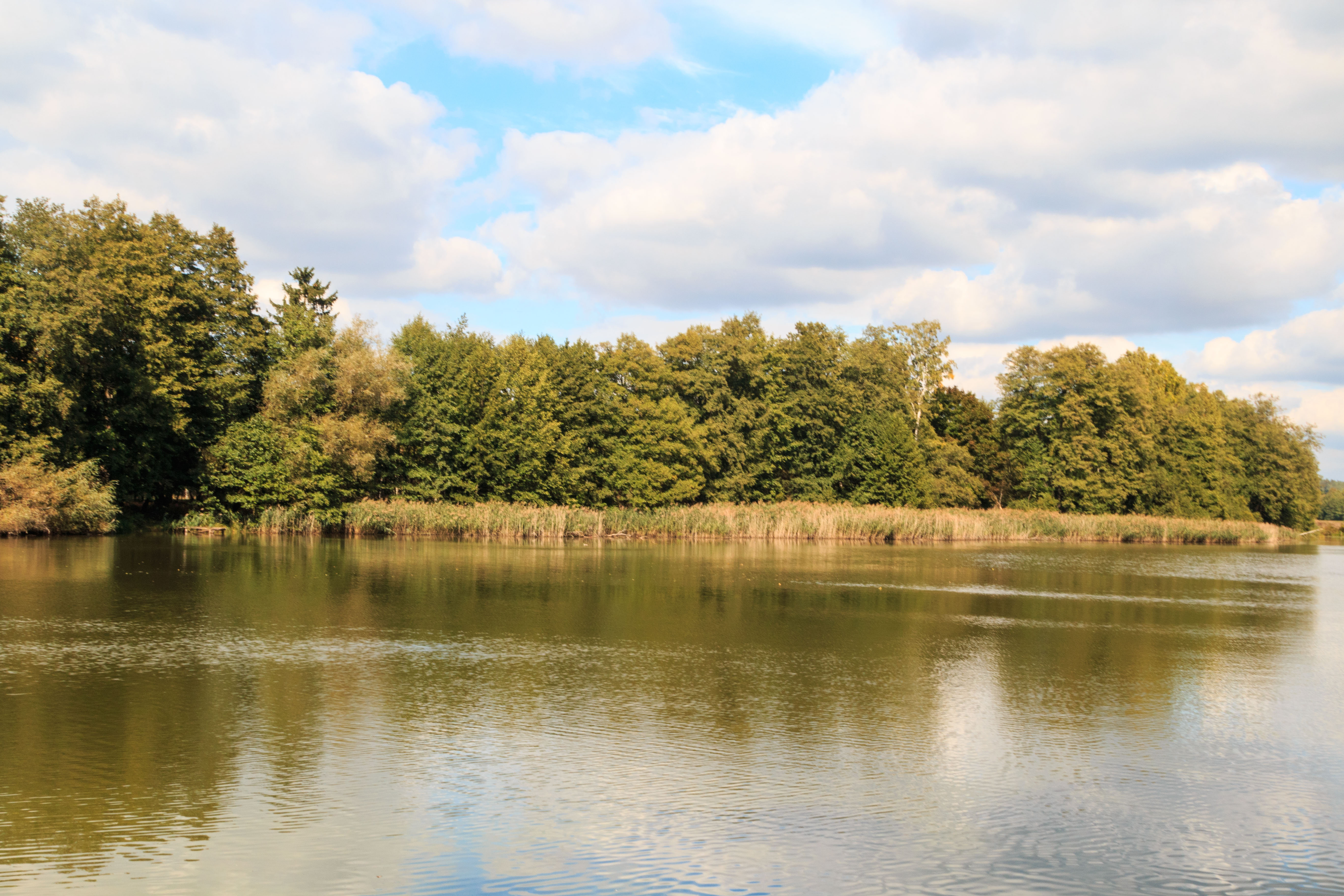 Mlýnský rybník u Hvězdova Project: Vodstvo.